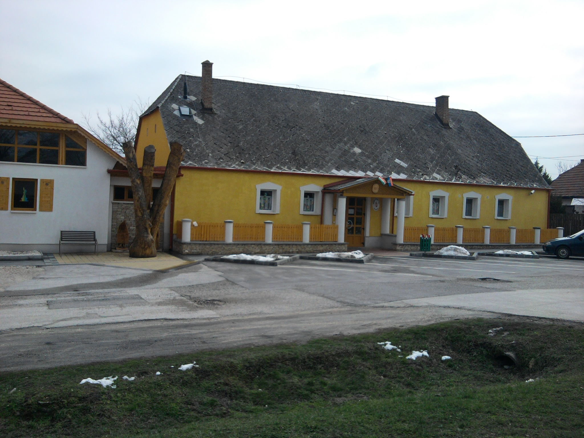 A perbáli óvoda a mesefával (Pest megye)